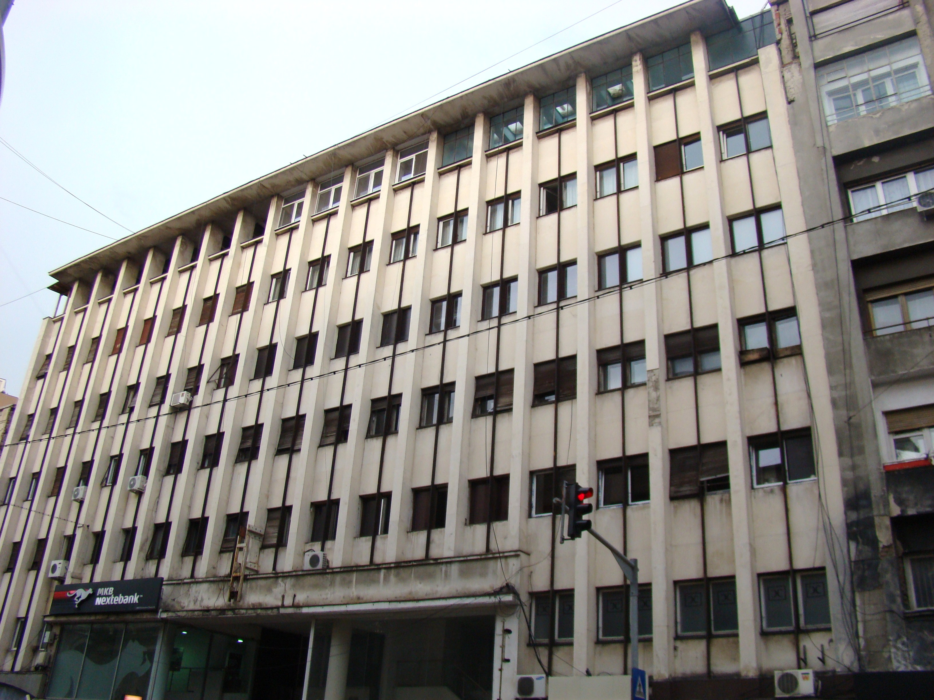 Blocul ARO (Calea Victoriei 91-93)